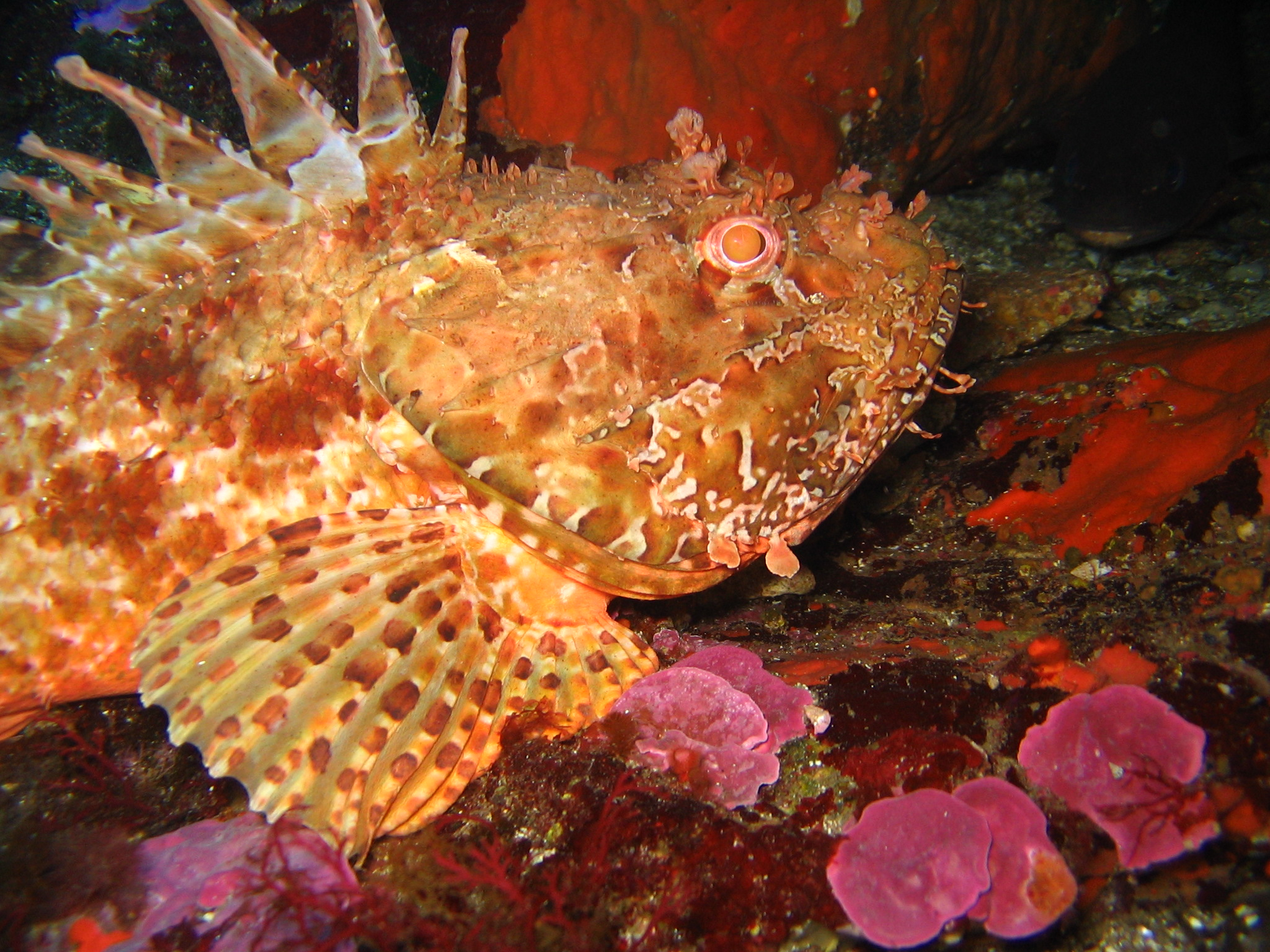 Scorpaena scrofa